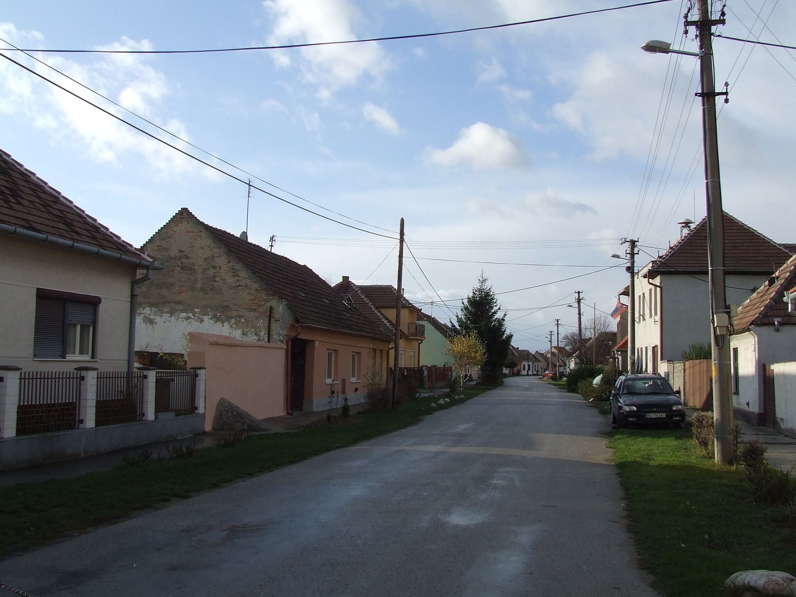 Horne Zelenice - stara ulica